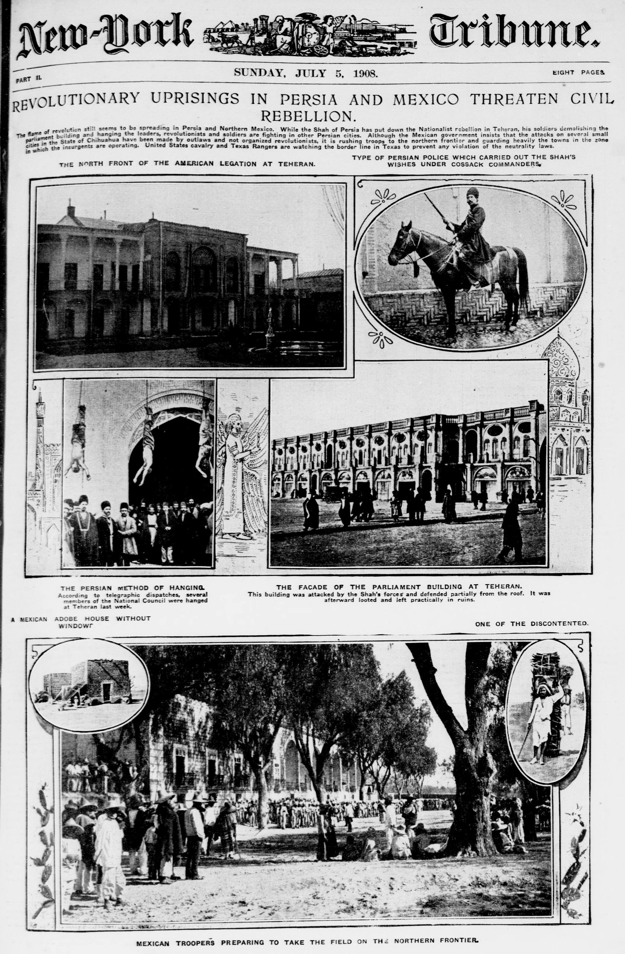 مشروطه در روزنامه